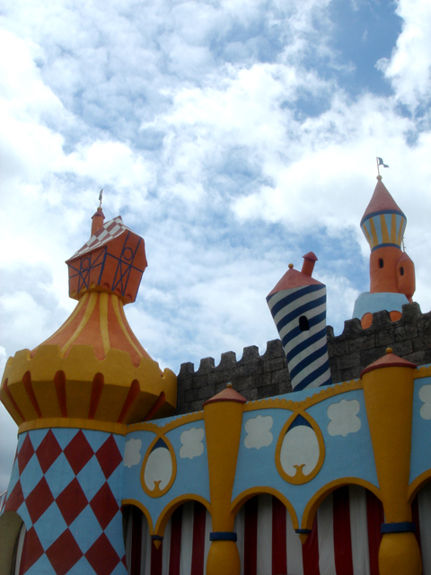 Atração "Castel di Lendas" no parque temático Hopi Hari em Vinhedo, São Paulo, Brasil.